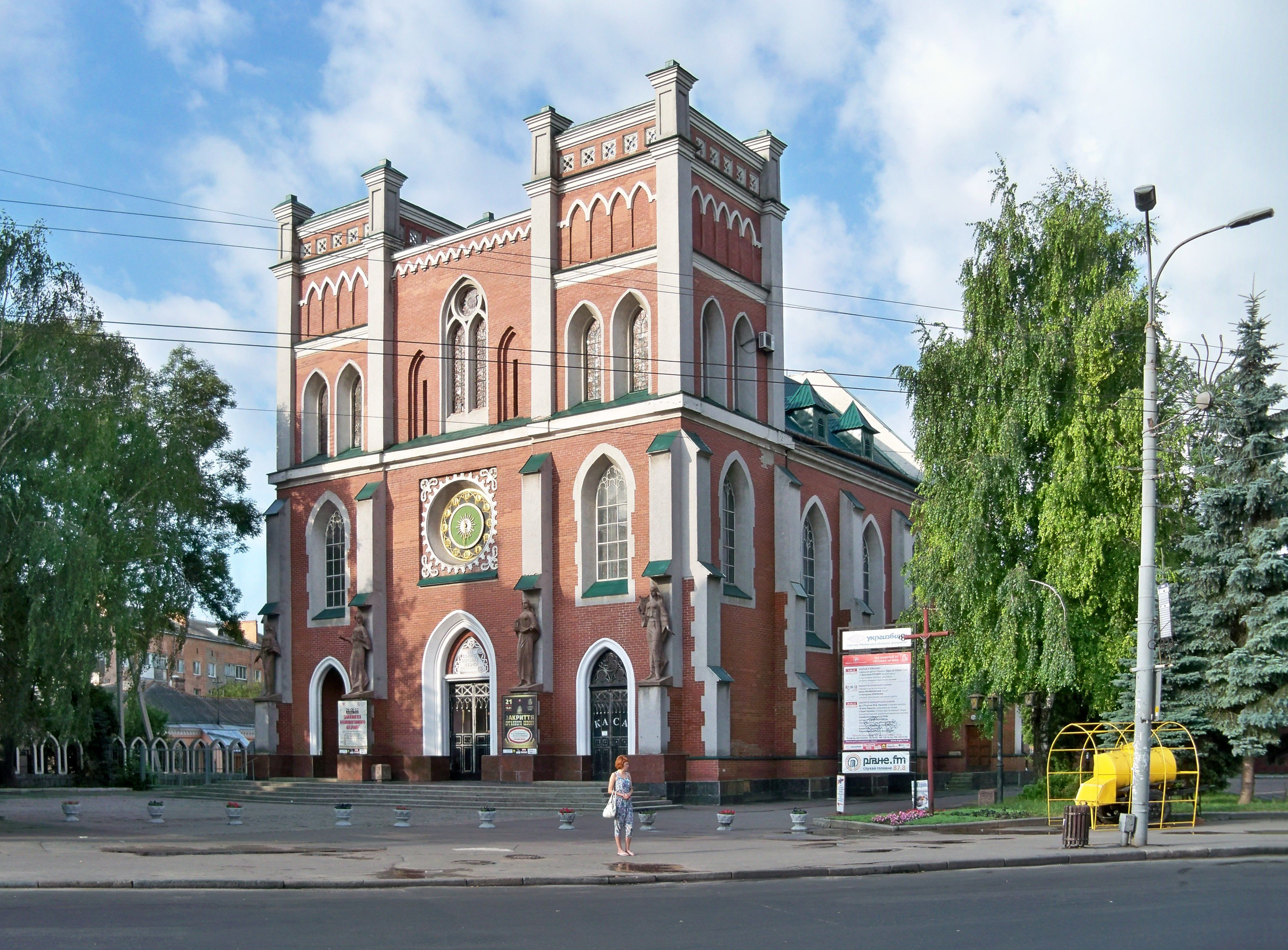 Ландшафтно-архітектурний комплекс (мур.), Рівне, вул.Соборна, 137